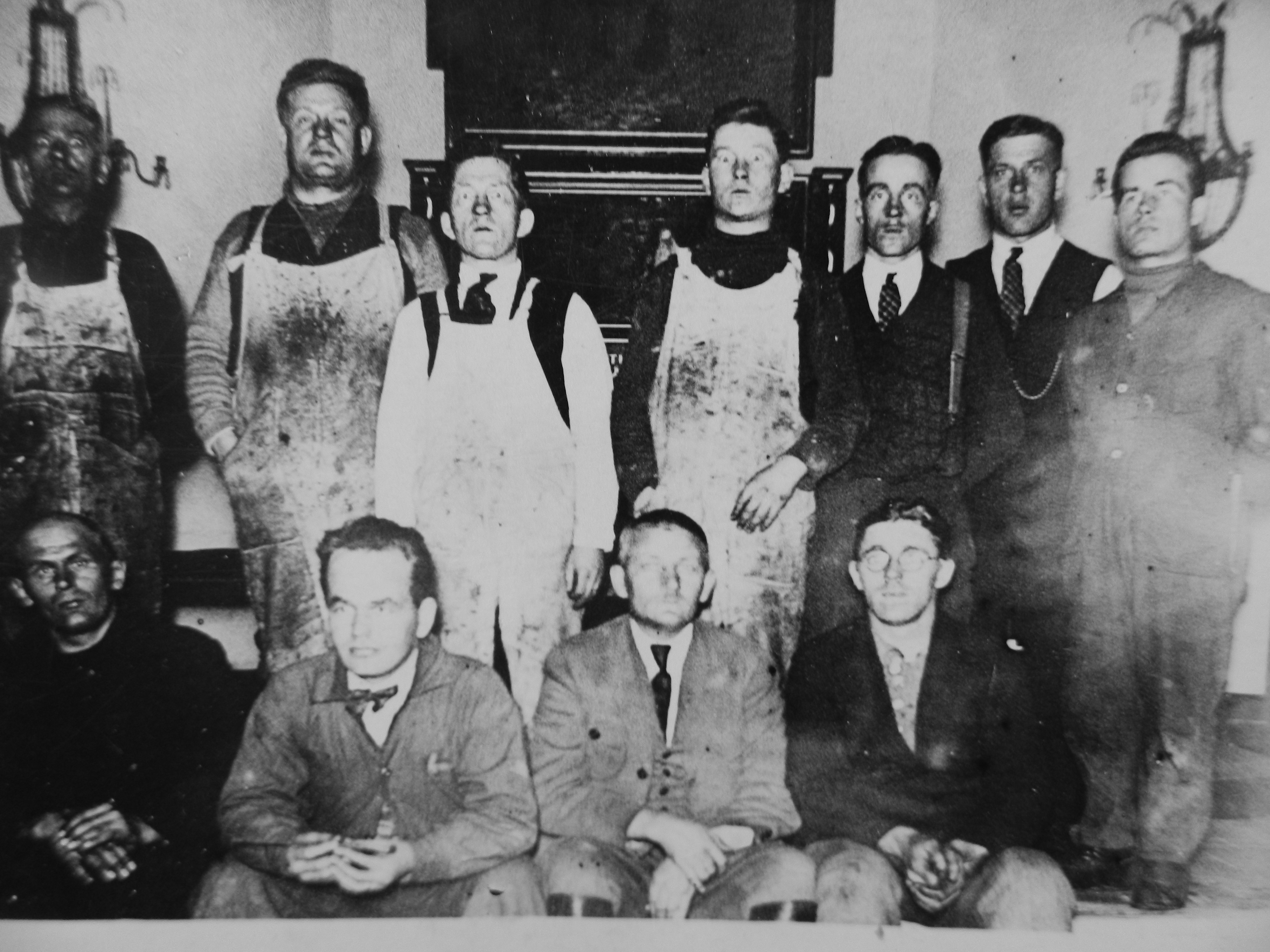 Työmiehet kirkon alttarin edustalla